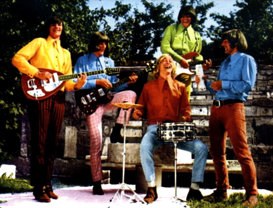 Skupina Kameleoni na naslovnici plošče Dedicated To The One I Love.